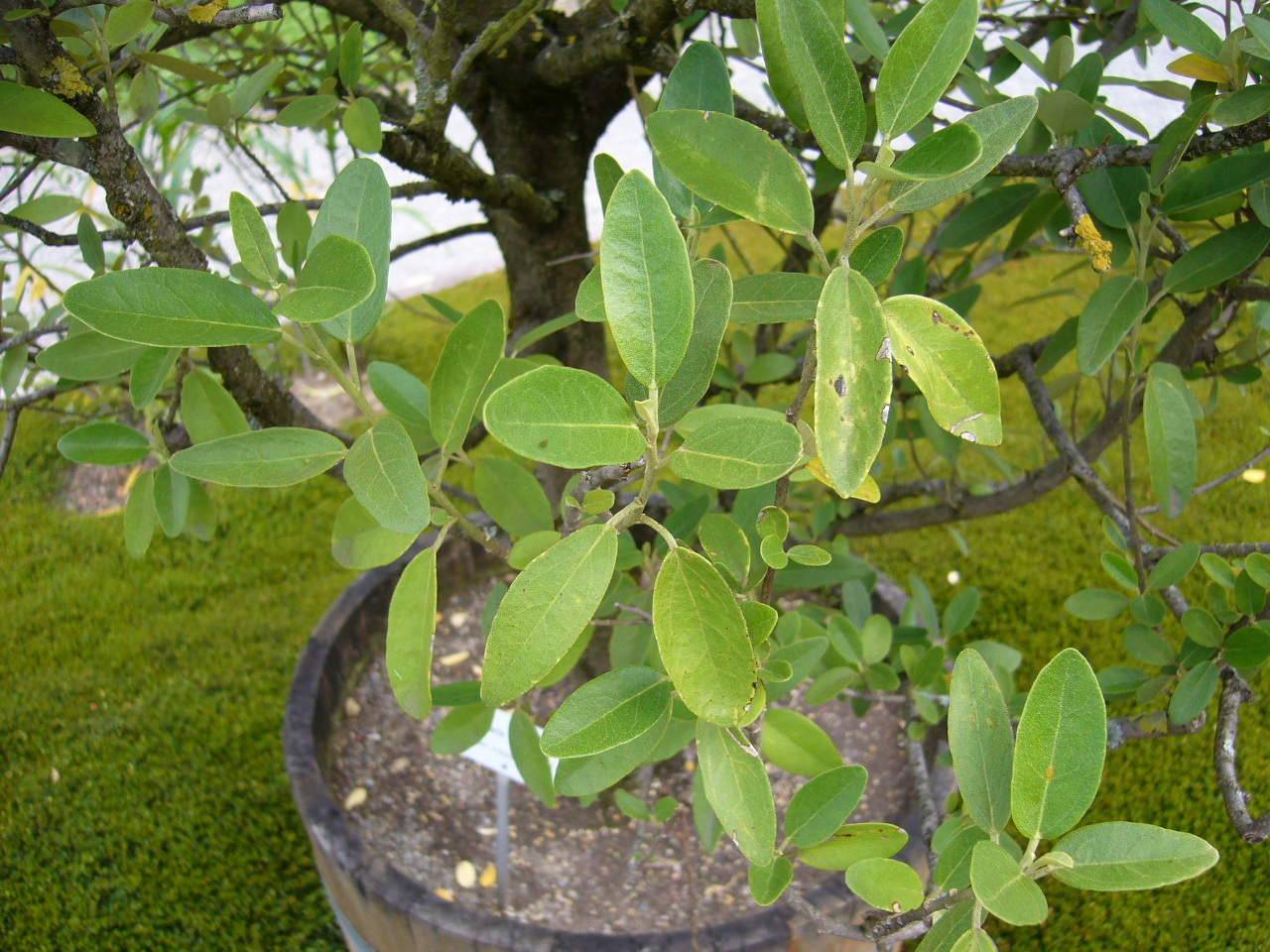 Lagunaria patersonii: Zweige